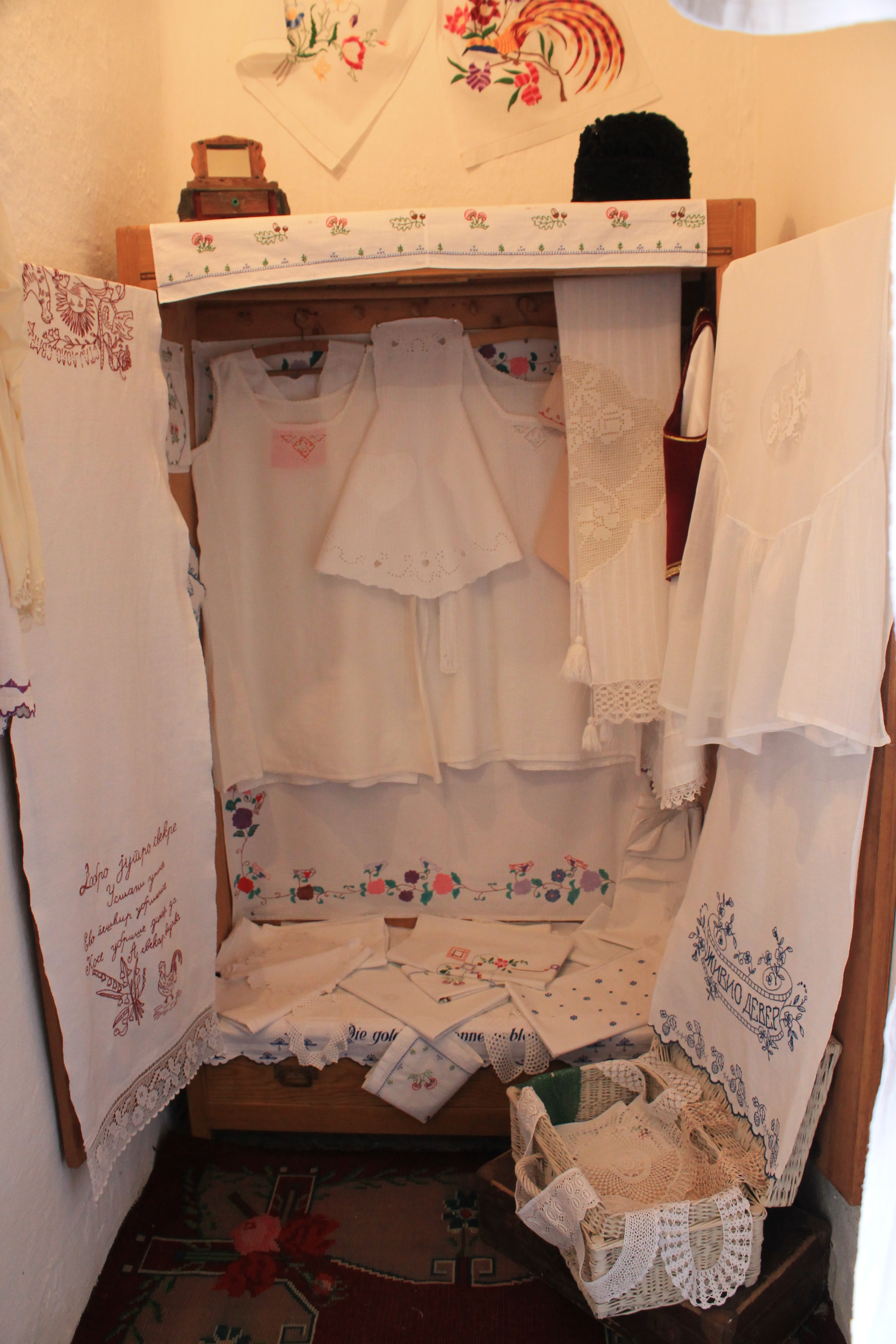 Etno kuća Majka Angelina - Grgurevci